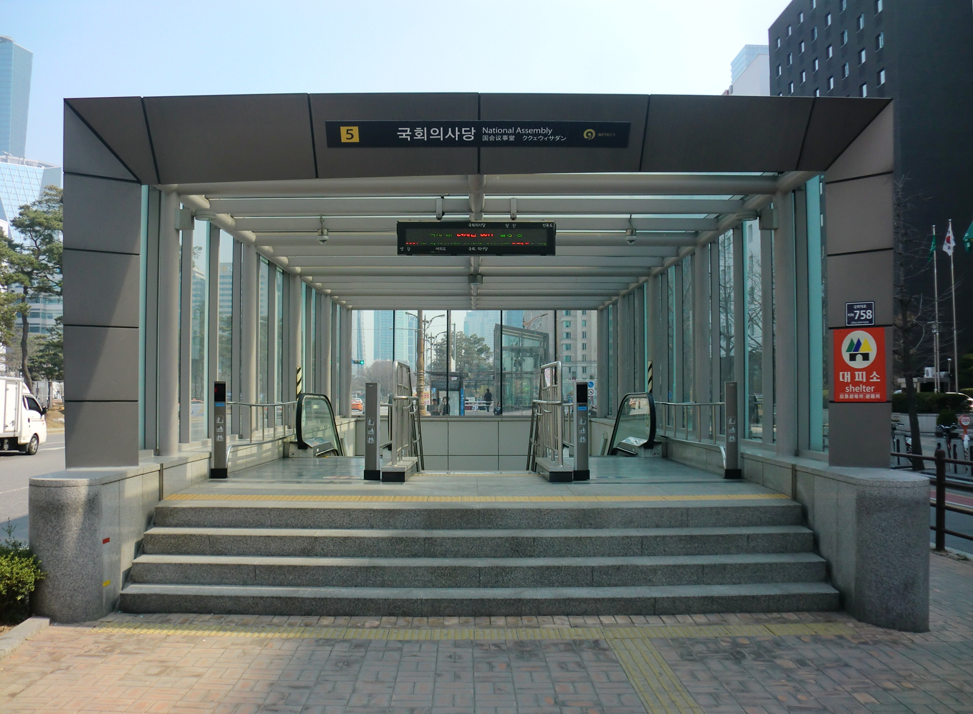 서울특별시 도시철도 5호선 국회의사당역 5번출입구